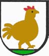 Herb wsi Kurów (gmina Stryszawa)